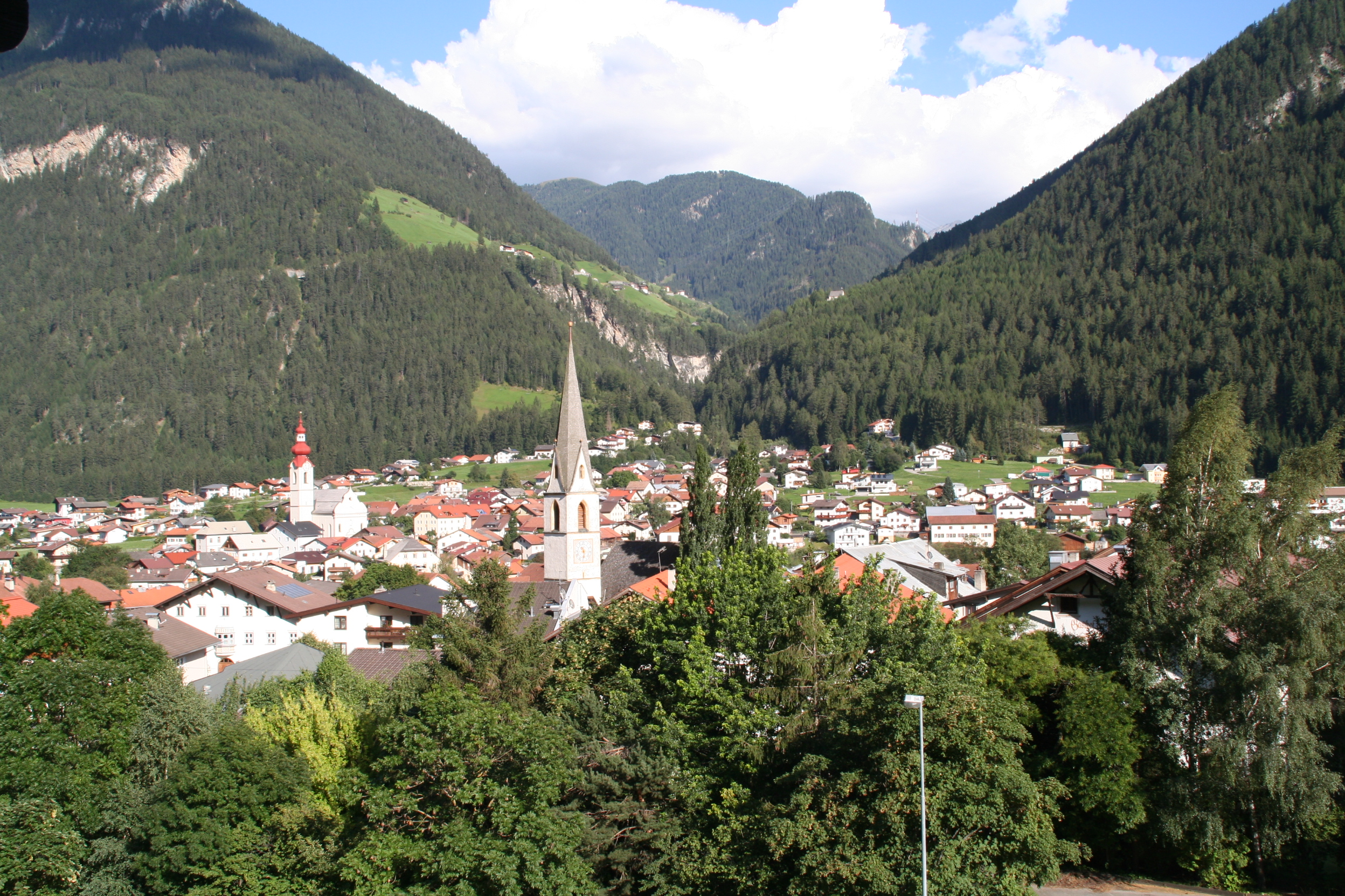 Pfunds